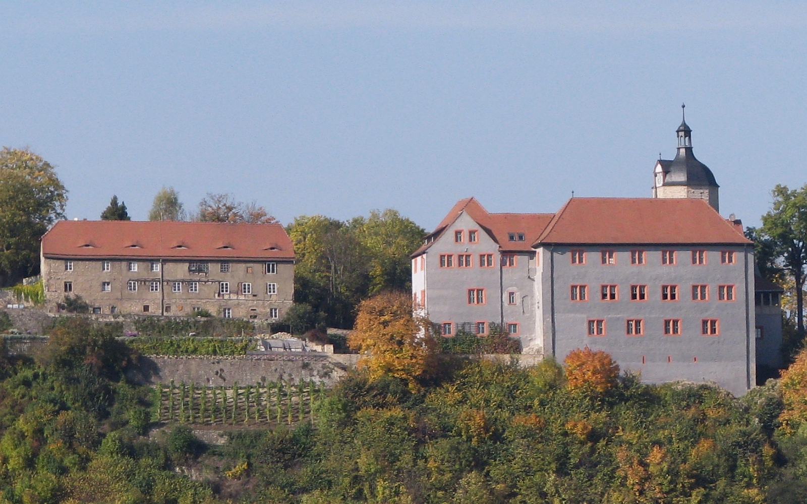 Dornburg an der Saale Dornburger Schlösser Altes Schloss Foto 2008 Wolfgang Pehlemann Wiesbaden IMG_0099